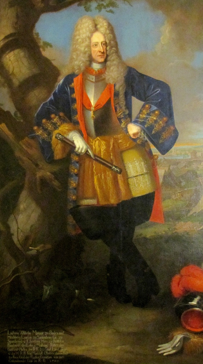 Porträt des Markgrafen Ludwig Wilhelm von Baden-Baden, genannt der Türkenlouis (1655-1707) . Unter seinem Kommando wurde u.a. auch 1702 die von Vauban geplante Festung Landau erfolgreich belagert und der berüchtigte damalige Festungsbefehlshaber Mélac vertrieben.